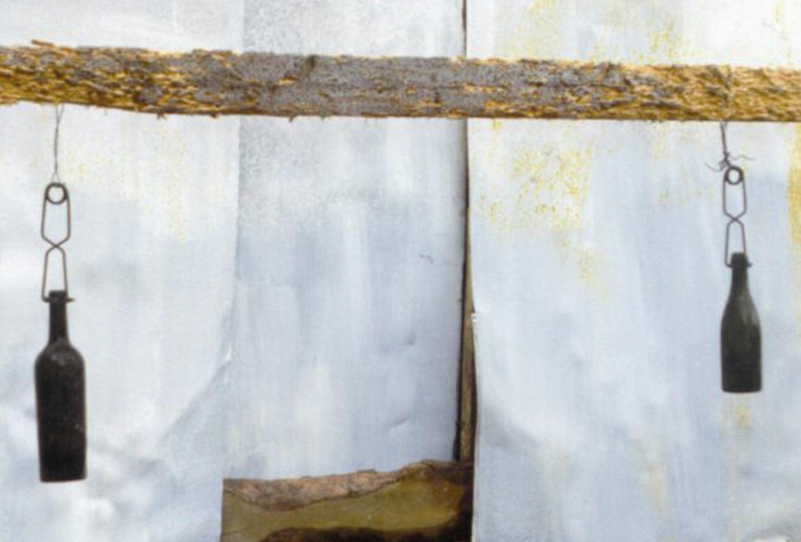 Stilhangende flessen